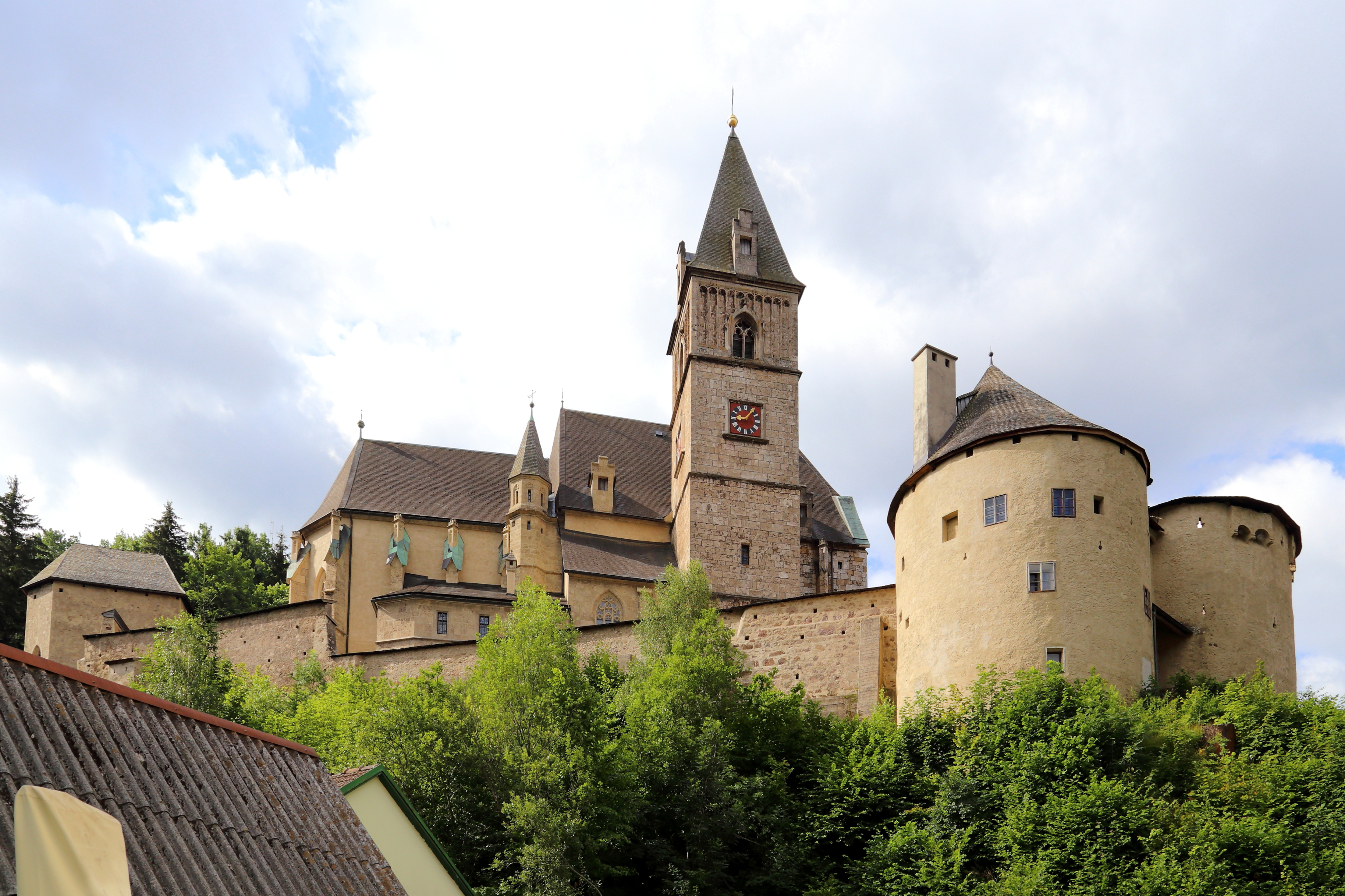 Die Kirchenfestungsanlage hl. Oswald in der österreichischen Stadt Eisenerz im steirischen Bezirk Leoben. Sie wurde zu Beginn des 16. Jahrhunderts im spätgotischen Stil errichtet.